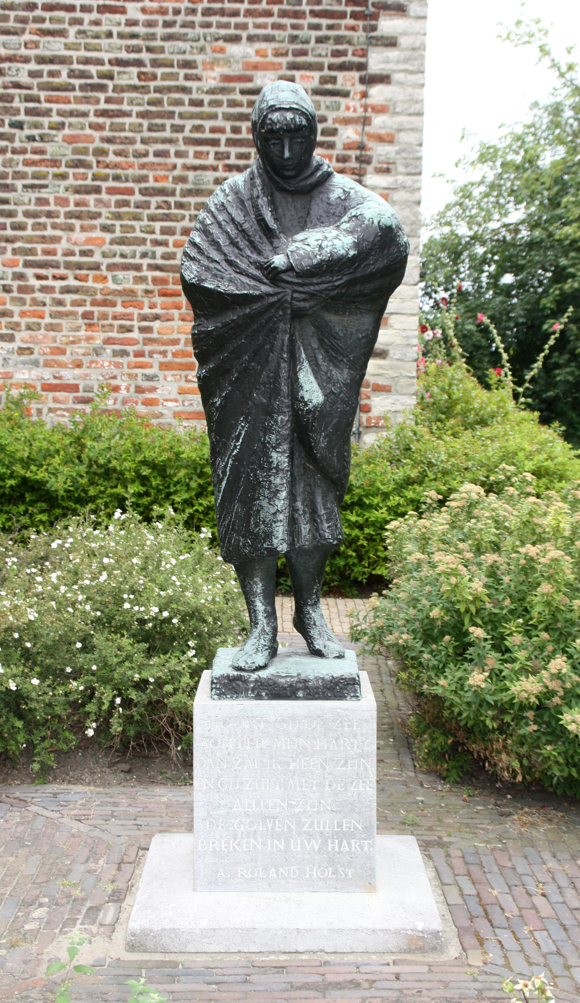 Watersnoodmonument, Burg. Elenbaasstraat 4 (bij de NH kerk), Kruiningen (gemeente Reimerswaal) Bronzenbeeld. Jonge vrouw met deken, dat een kind tegen zich aandrukt. (Alleen een handje is te zien) Beeldhouwer: Jan Wolkers